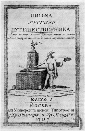 Pisma ruskoskogo putěšetvennika, vydání 1797